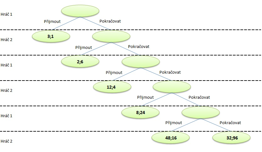 Rozšířená forma hry - postup tvorby stromu hry - fáze 2. Modifikace příkladu z publikace: DLOUHÝ, Martin; FIALA, Petr. Úvod do teorie her. 2.přepracované vydání. Vysoká škola ekonomická v Praze : Nakladatelství Oeconomica, 2009. 120 s. ISBN 978-80-245-1609-7.